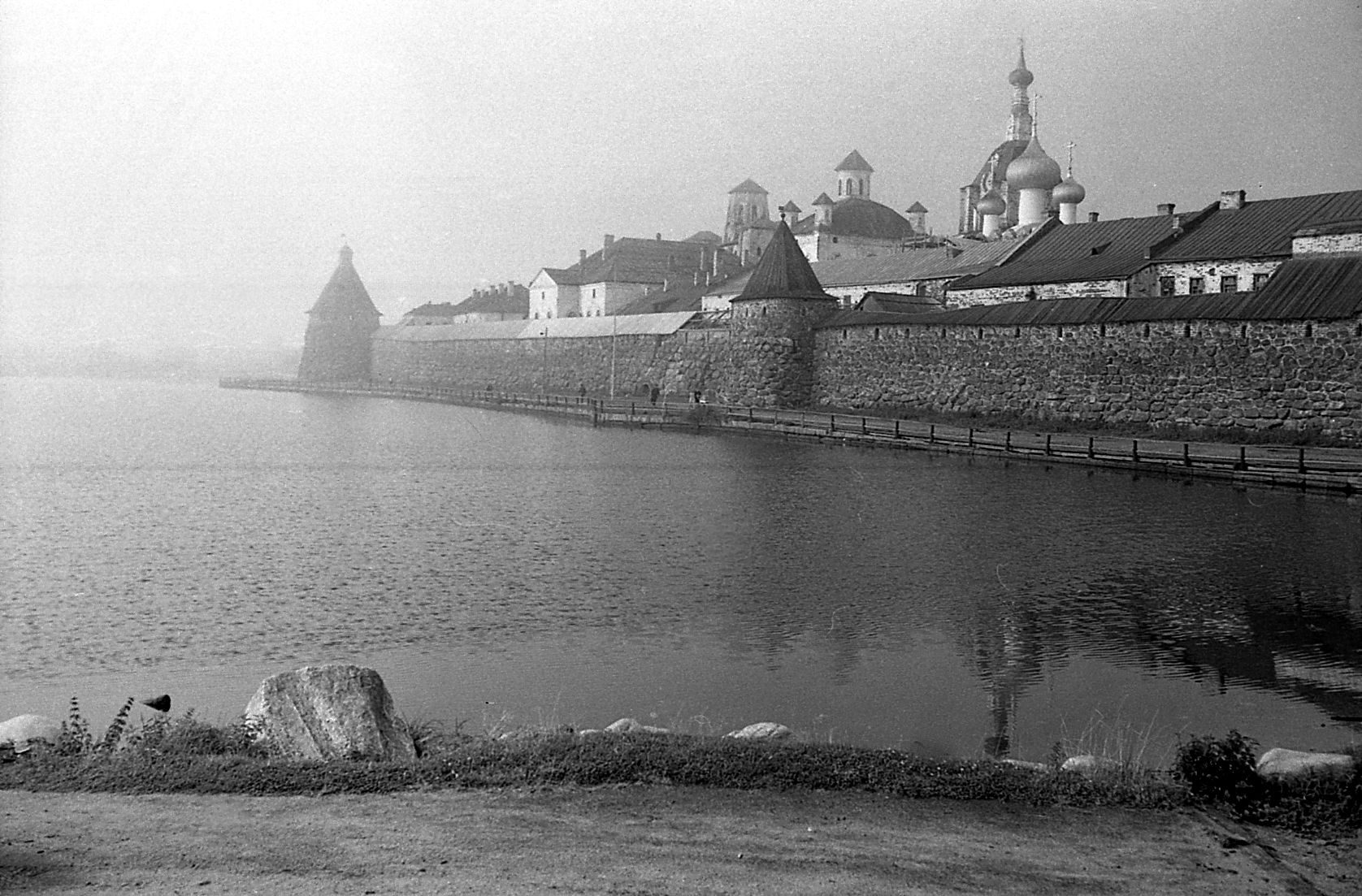 Святое озеро и Соловецкий монастырь с Юго-Запада